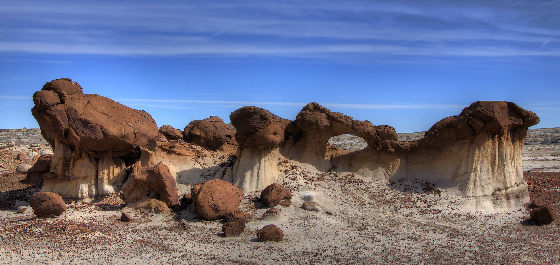 Bisti Badlands, 2010